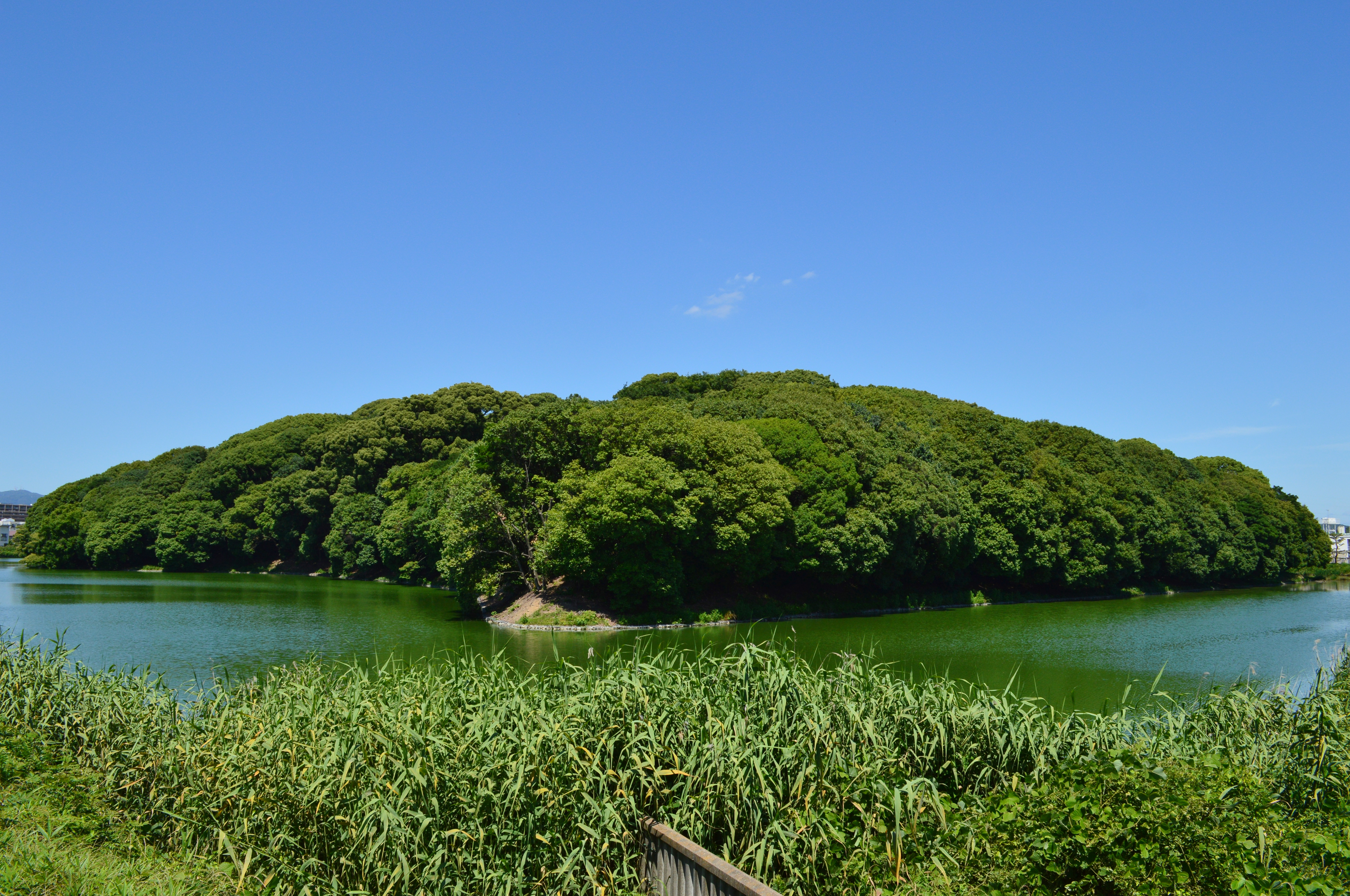 岡ミサンザイ古墳 墳丘全景